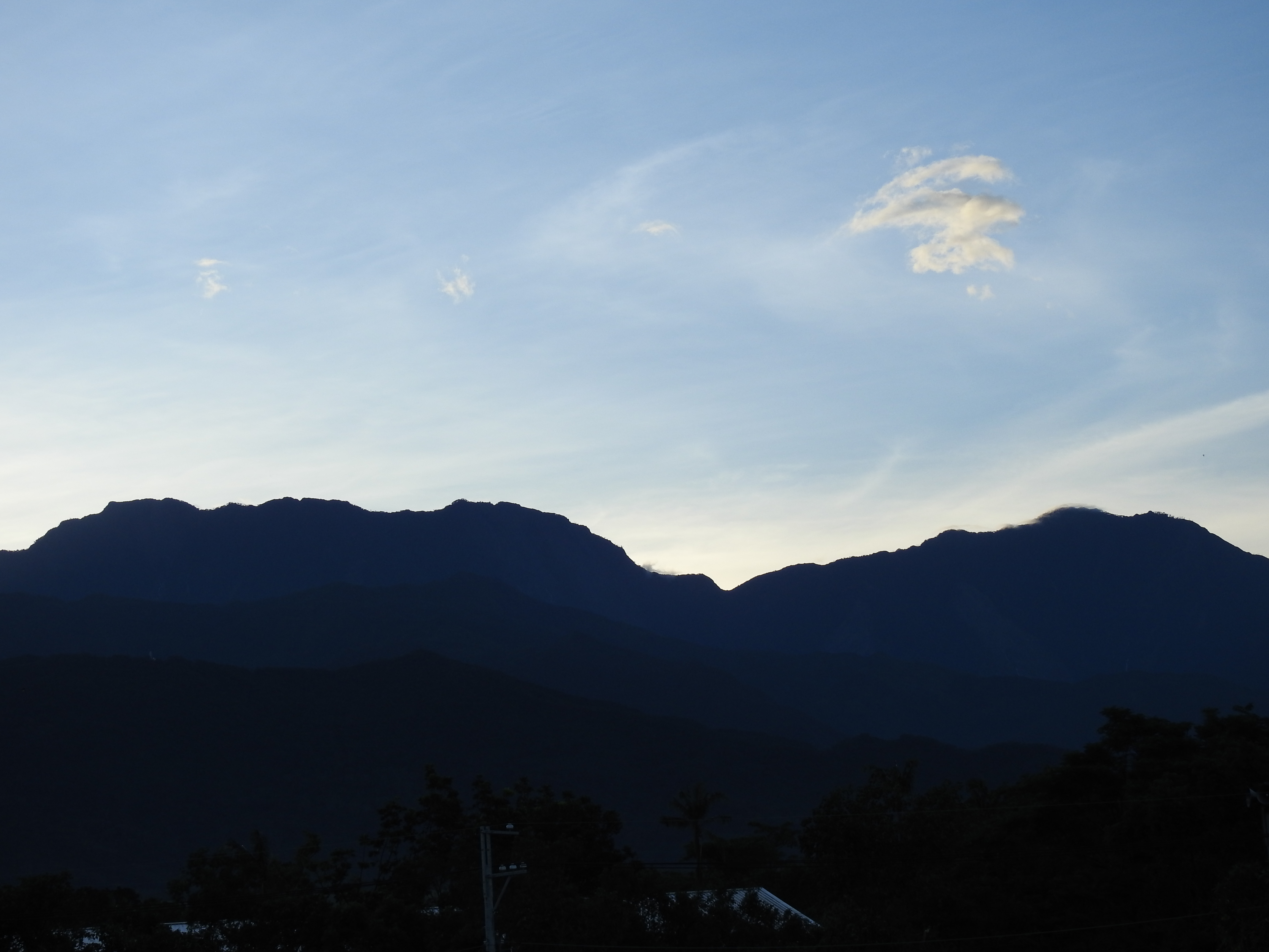 拍攝於屏東內埔大新村